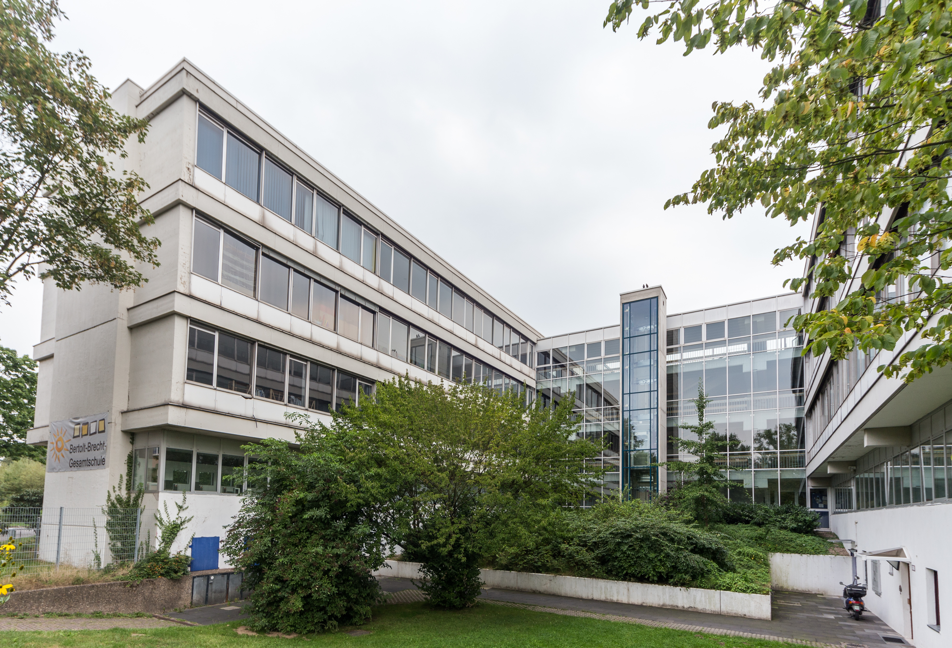 Bertolt-Brecht-Gesamtschule, Schlesienstraße 21–23, Bonn-Tannenbusch: Blickrichtung Osten